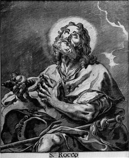 after Cherubino Alberti